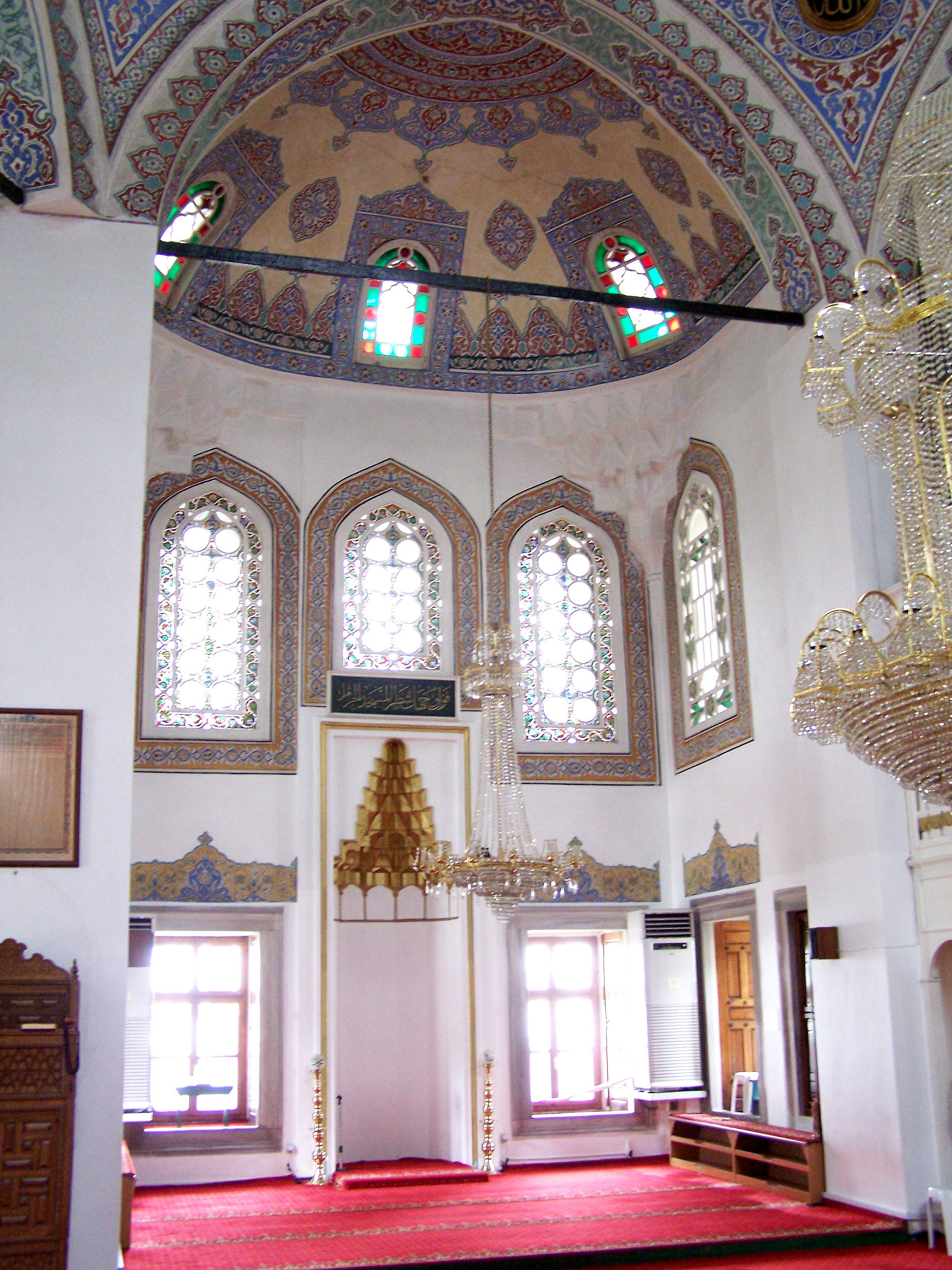 Mihrap of Molla Çelebi Camii in Fındıklı